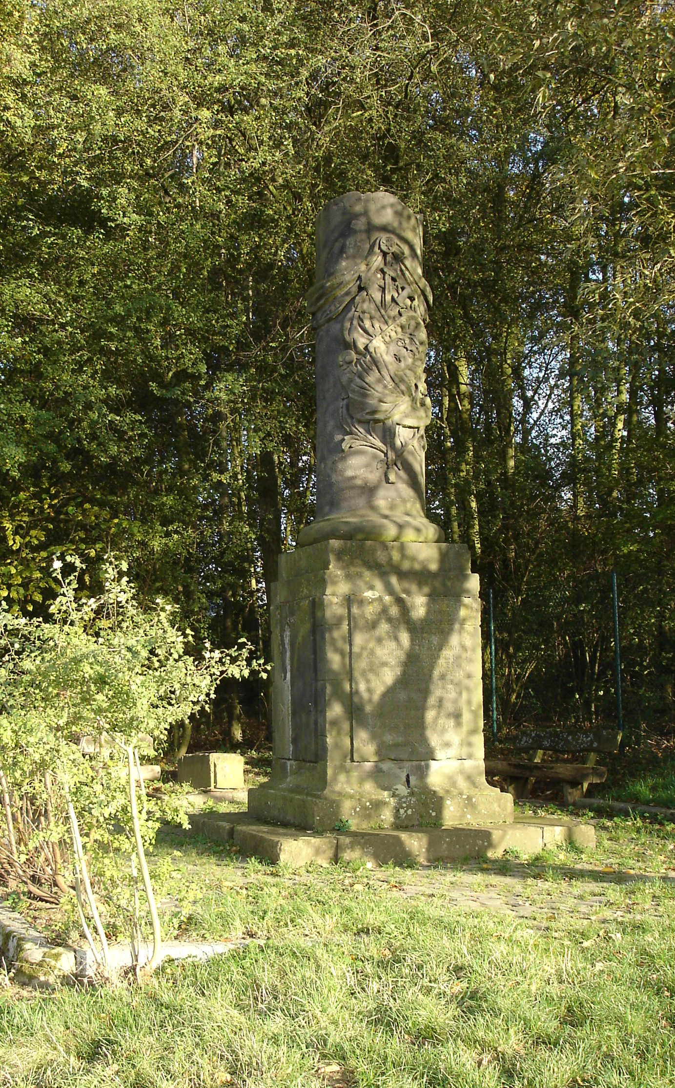 Ehrensäule zur Kaiserkrönung von Leopold II. (1790) in Frankfurt am Main.